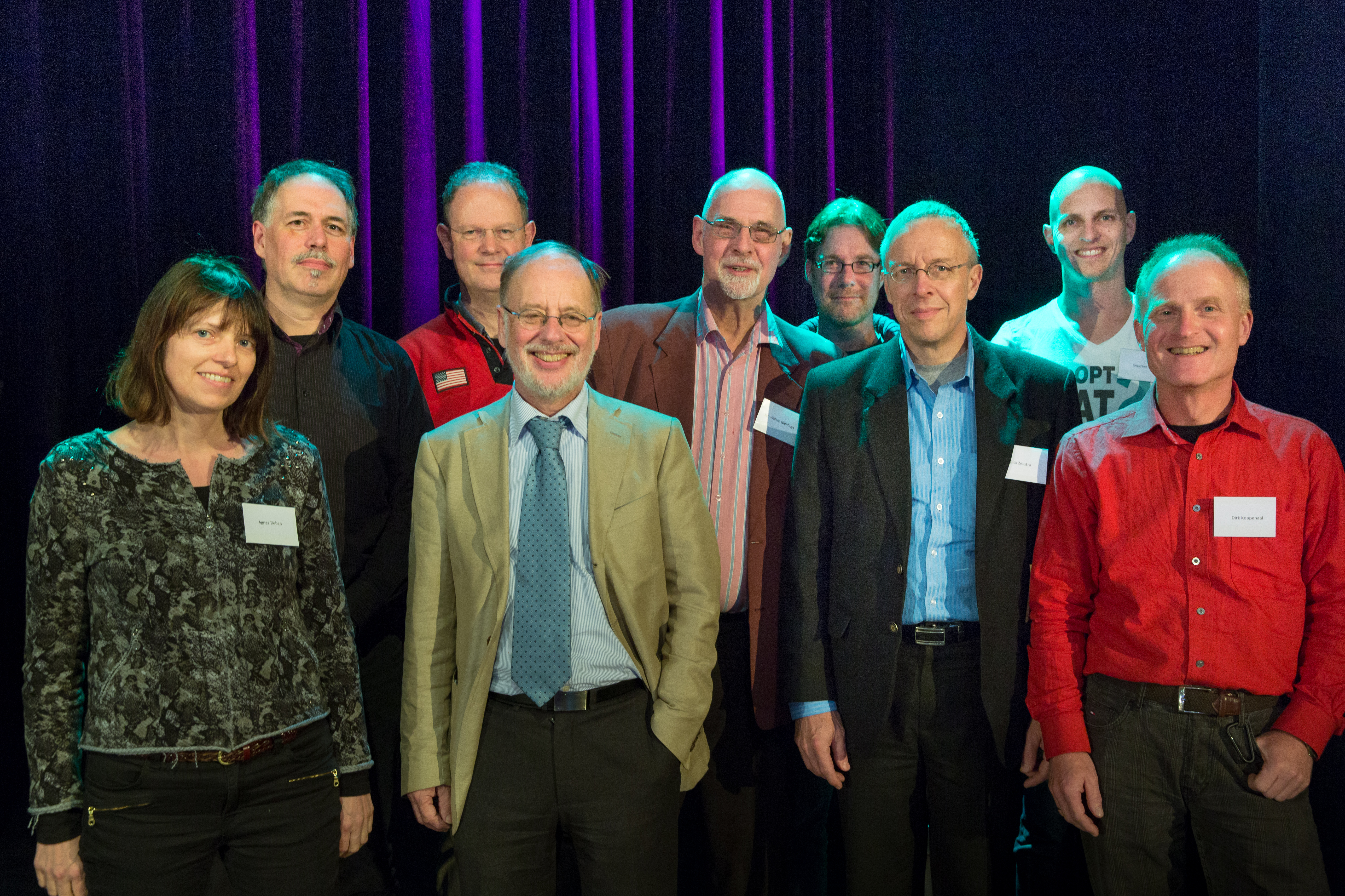 Bestuursleden van de Stichting Skepsis tijdens het Skepsis Congres 2015 in Zwolle. Van links naar rechts: Agnes Tieben, Mario Tamboer, Gert Jan van 't Land, Frank Israel, Jan Willem Nienhuys, Pepijn van Erp, Dick Zeilstra, Maarten Koller en Dirk Koppenaal.